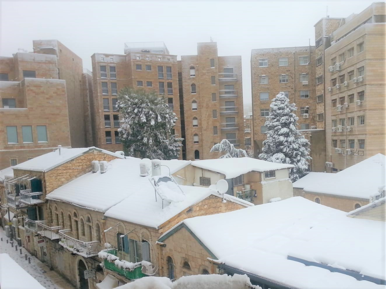 שכונת נחלת שבעה בשלג פברואר 2015